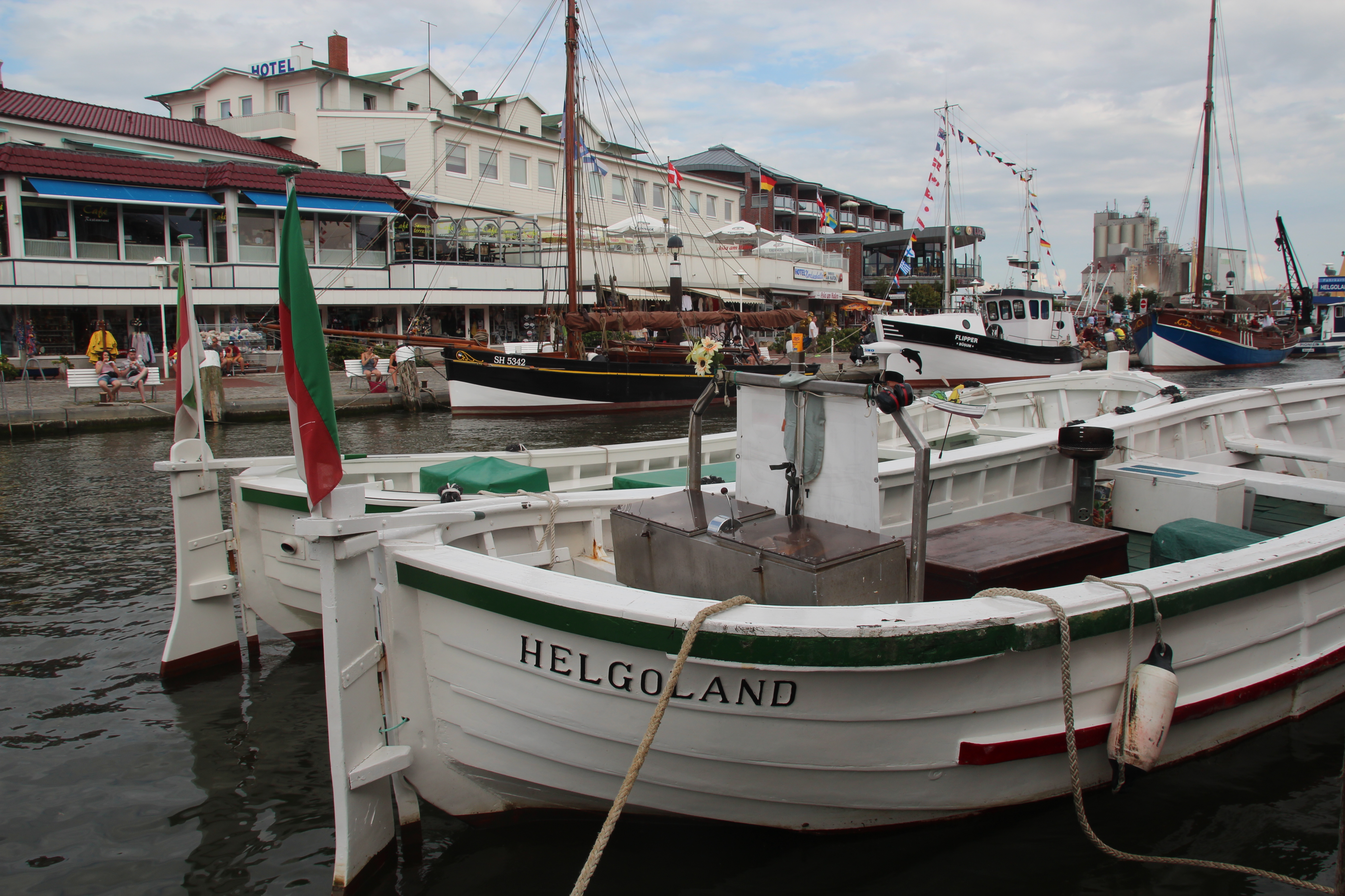 Båter fra Helgoland